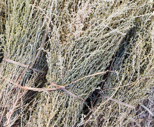 bouquet d'armoise prit en photo au marché de Ain Sefra